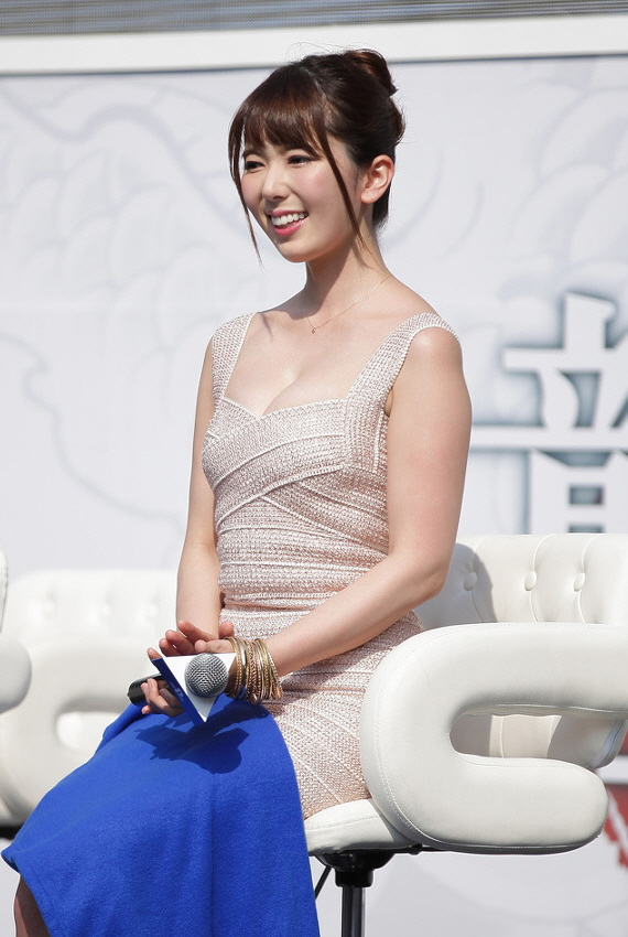 하타노유이(Yui Hatano) 용과같이 극 기념행사